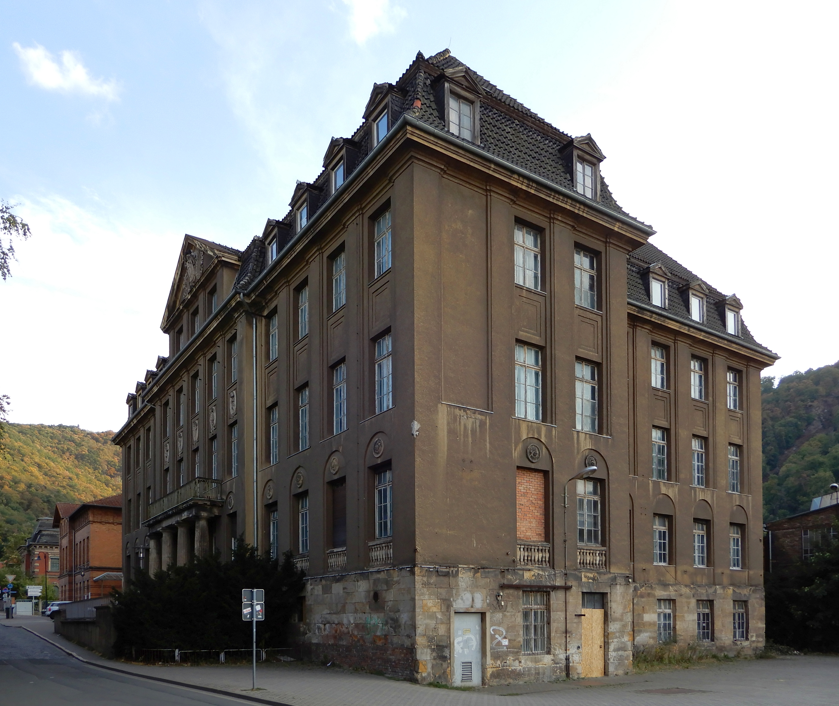 Detail Poststraße 1b, Thale